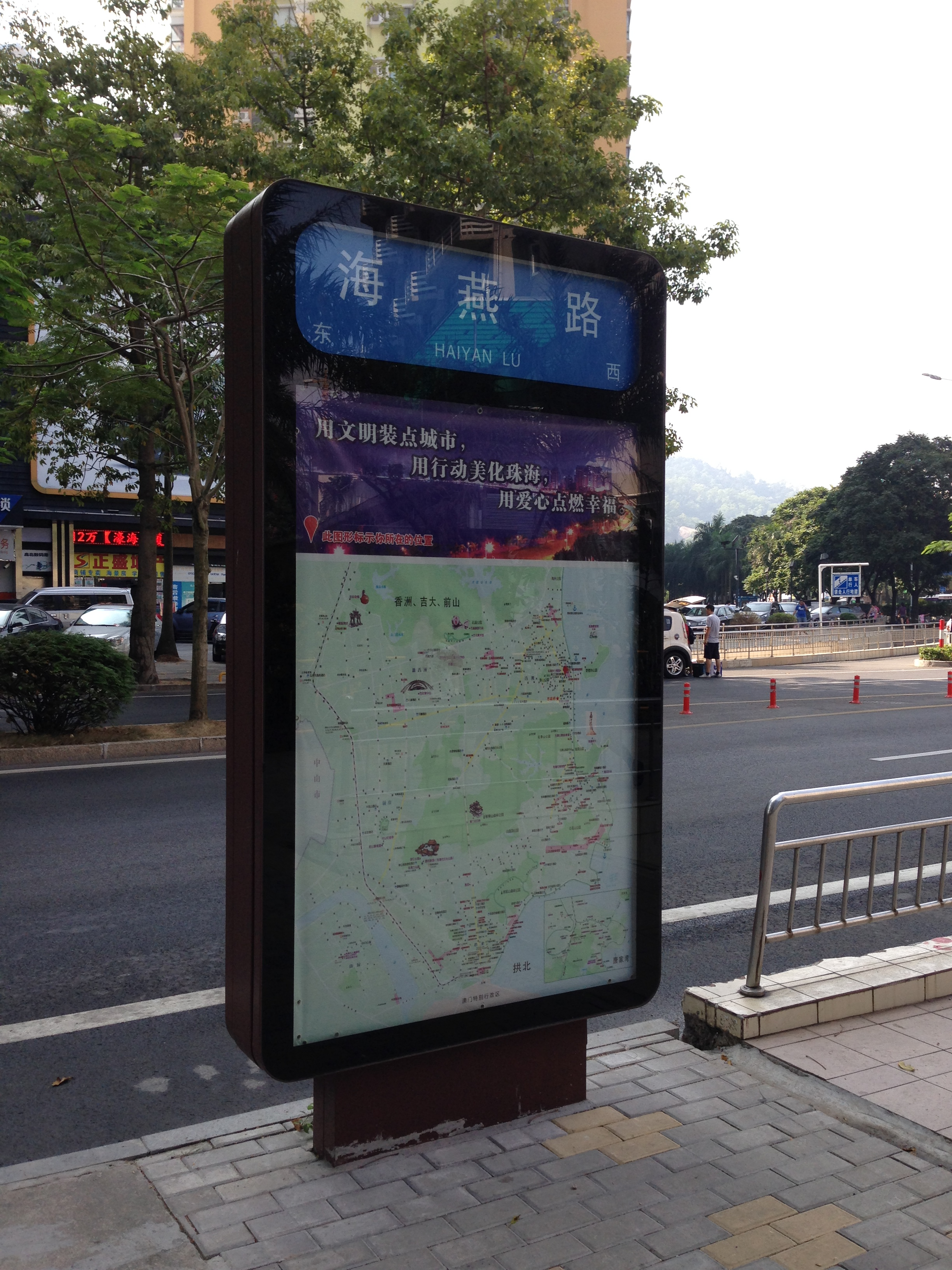 珠海海燕路